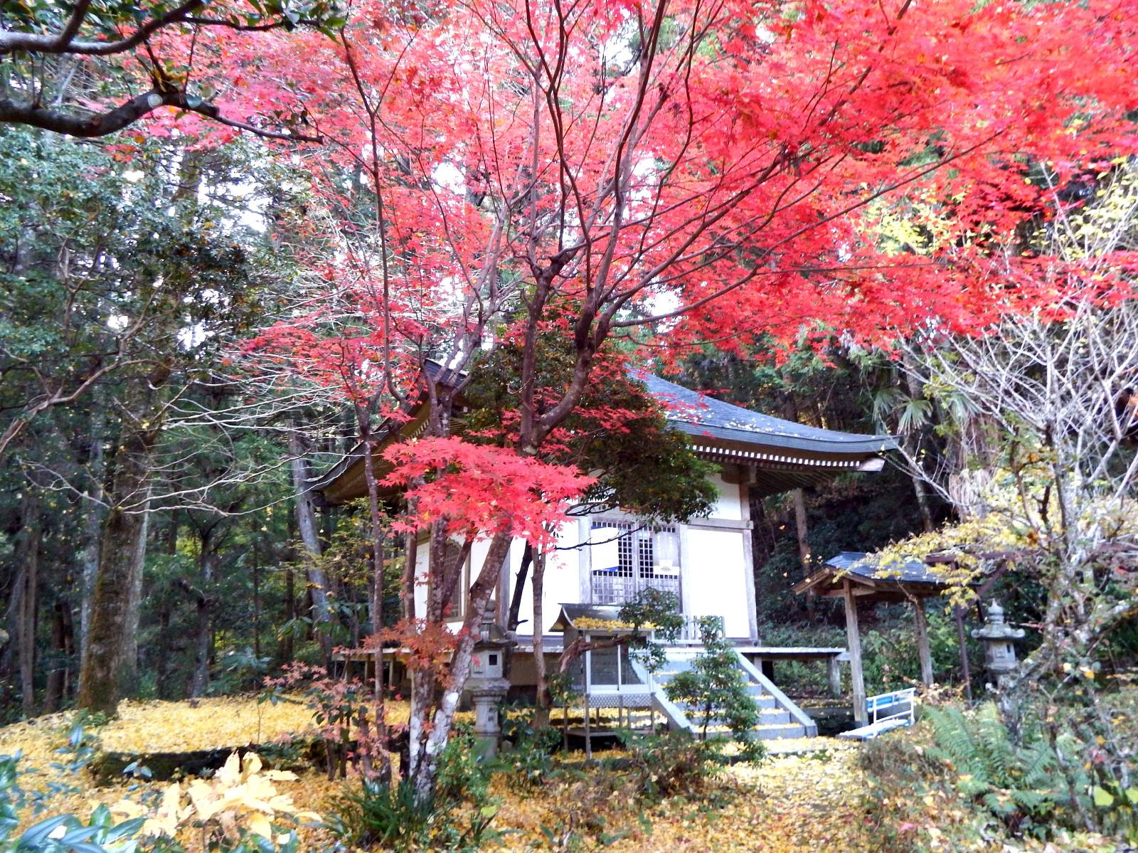 大宝寺の掘り出し観音堂